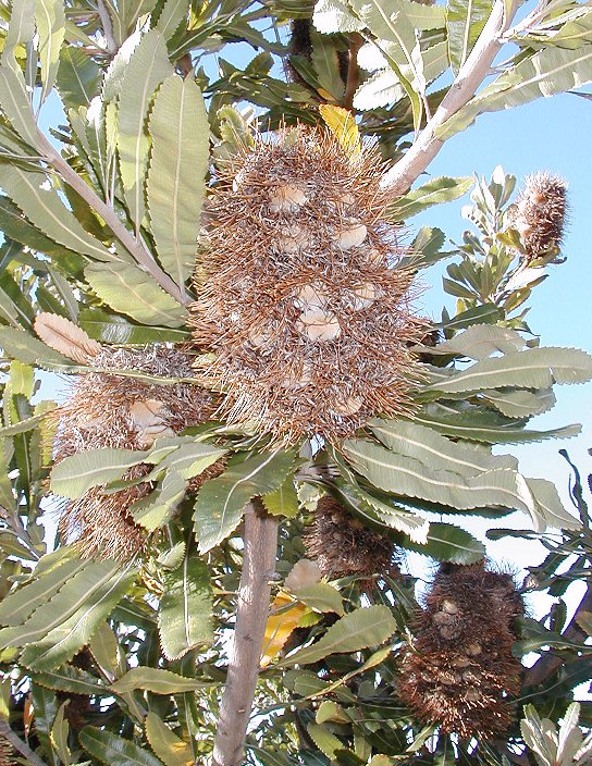 Follicles on Banksia serrata.